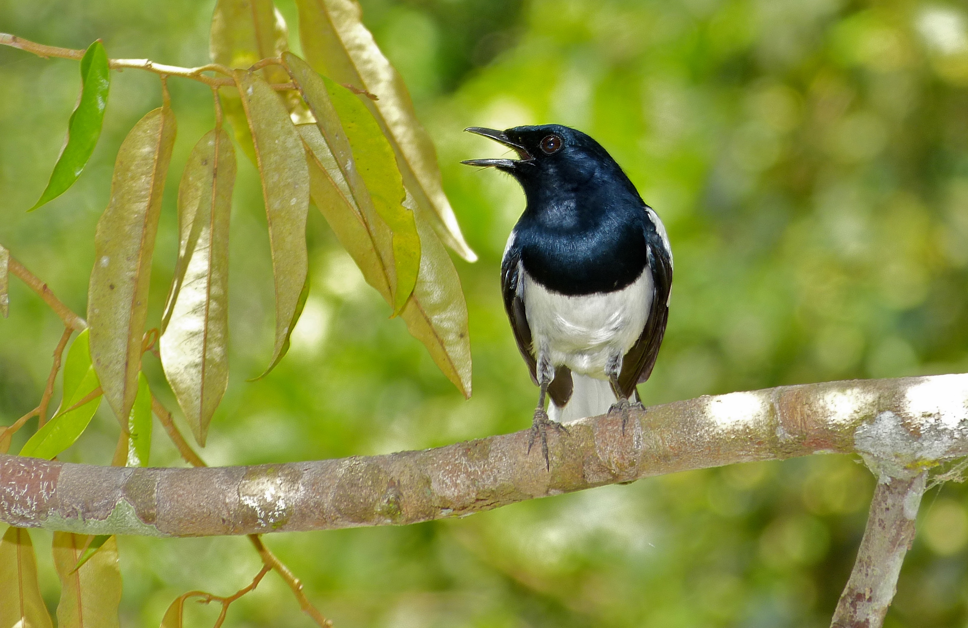 Taman Negara NP, Pahang, MALAYSIA